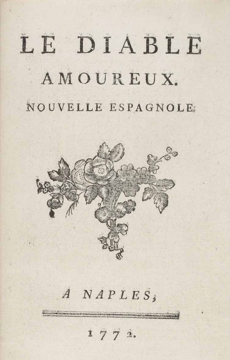 Page titre de l'édition originale du "Diable amoureux" (1772)